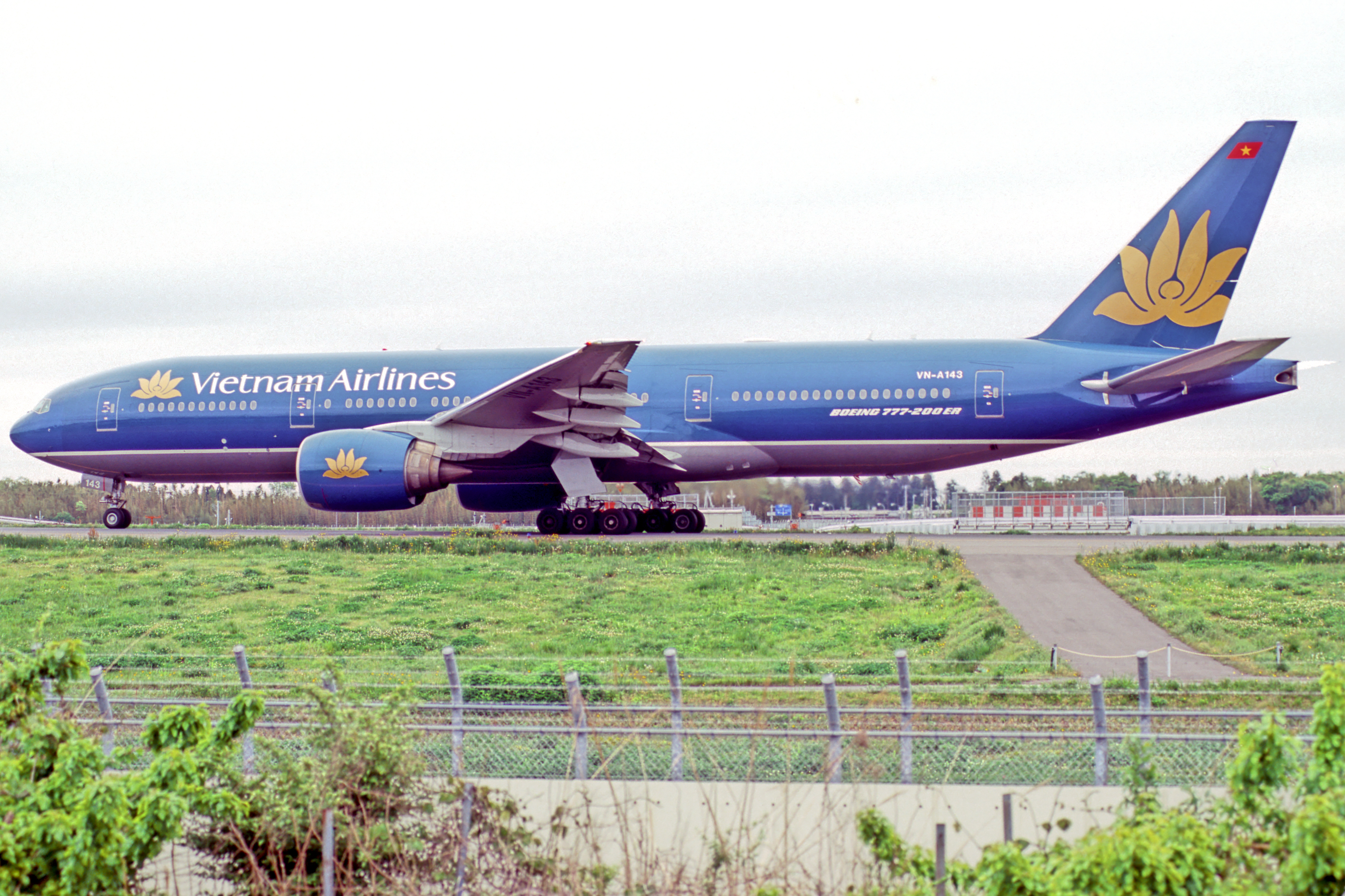 Vietnam Airlines Boeing 777-26KER (VN-A143/33502/450)